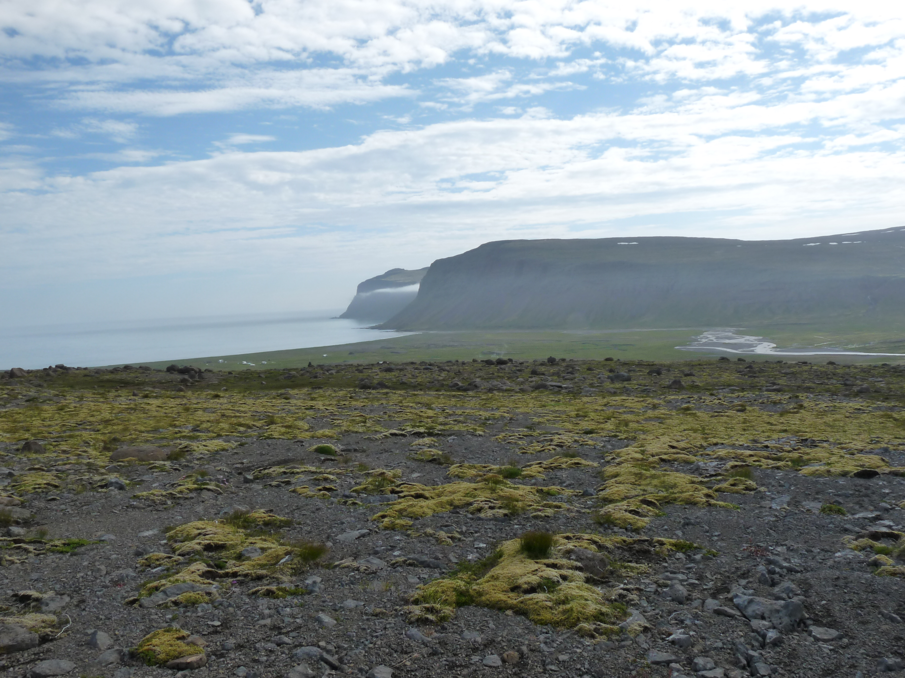 Reykjafjörður valley